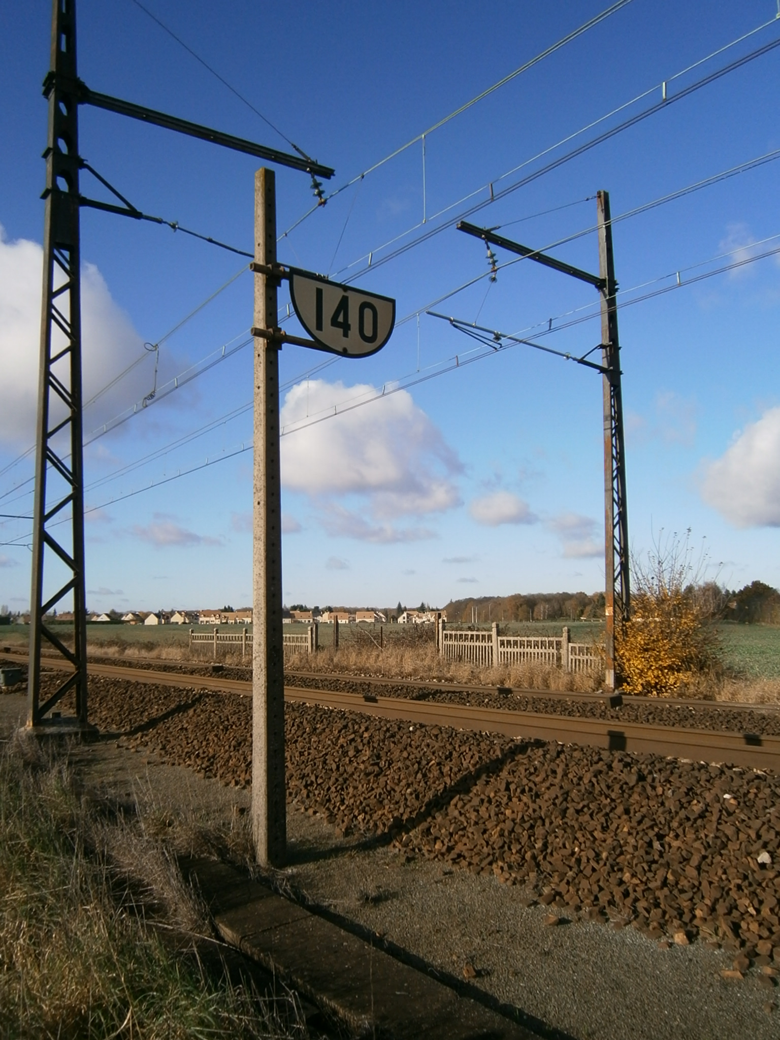 Le panneau de limitation de vitesse 140 km/h, de la ligne de Paris-Montparnasse à Brest, peu avant la gare de Gazeran (78).